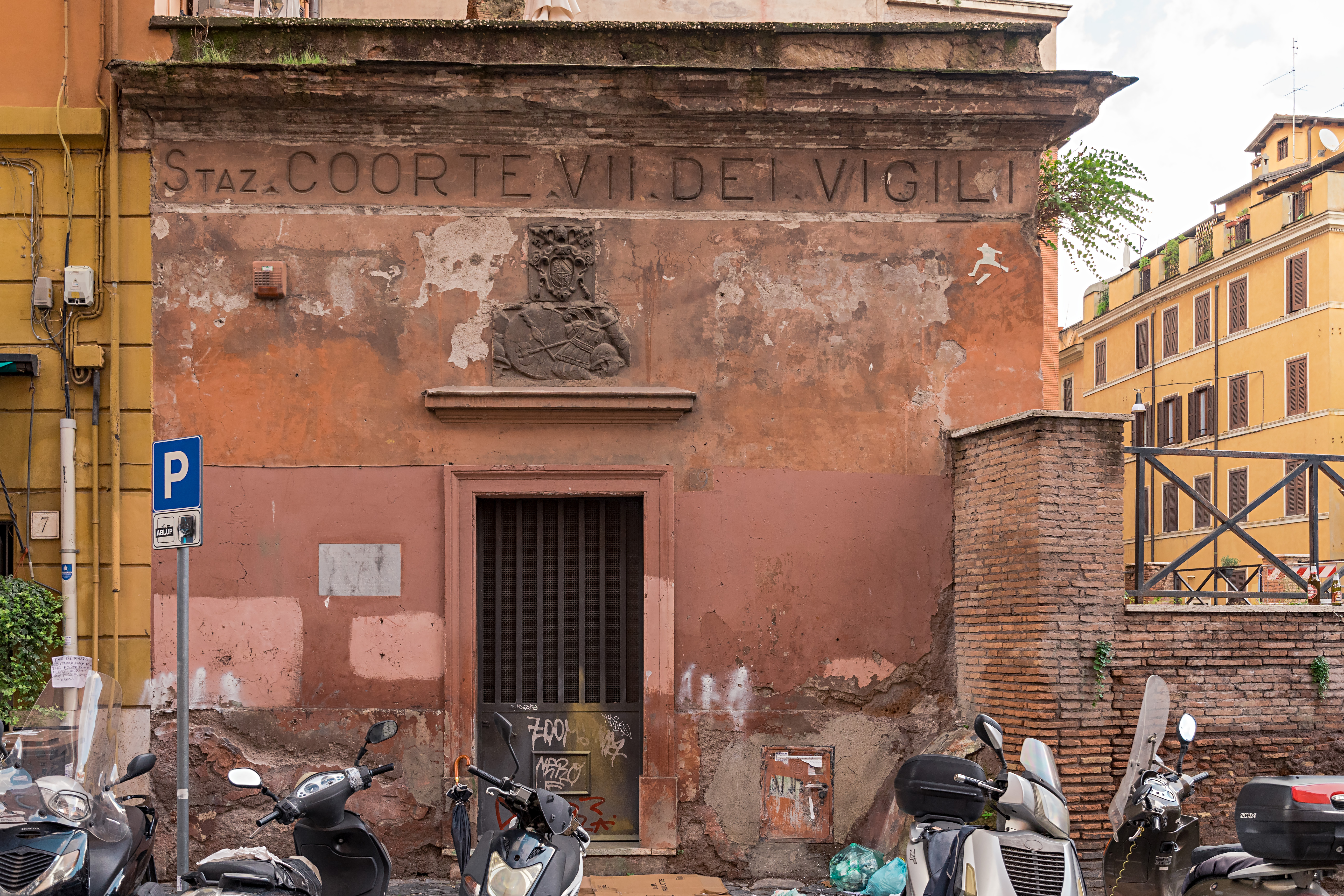 Das Haus mit der Hausnummer 9 in der Straße Via della VII Coorte, im Stadtteil Trastevere in Rom, ist der heutige Zugang zu dem unter dem Gebäude befindlichen Wachlokal (Excubitorium) der städtischen Feuerwehr mit Polizeiaufgaben (cohortes vigilum) aus der römischen Kaiserzeit.